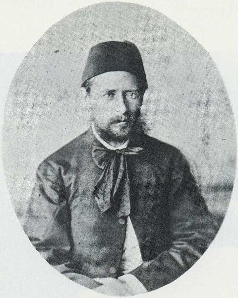 Эрнст Марно